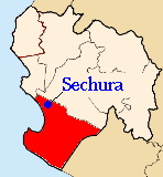 Localización de Sechura